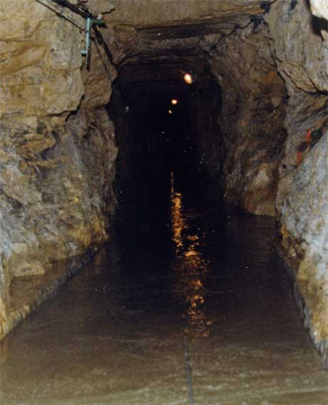 Zwarte Forelgalerij. Foto gemaakt augustus 1993, gedigitaliseerd 16 november 2006.